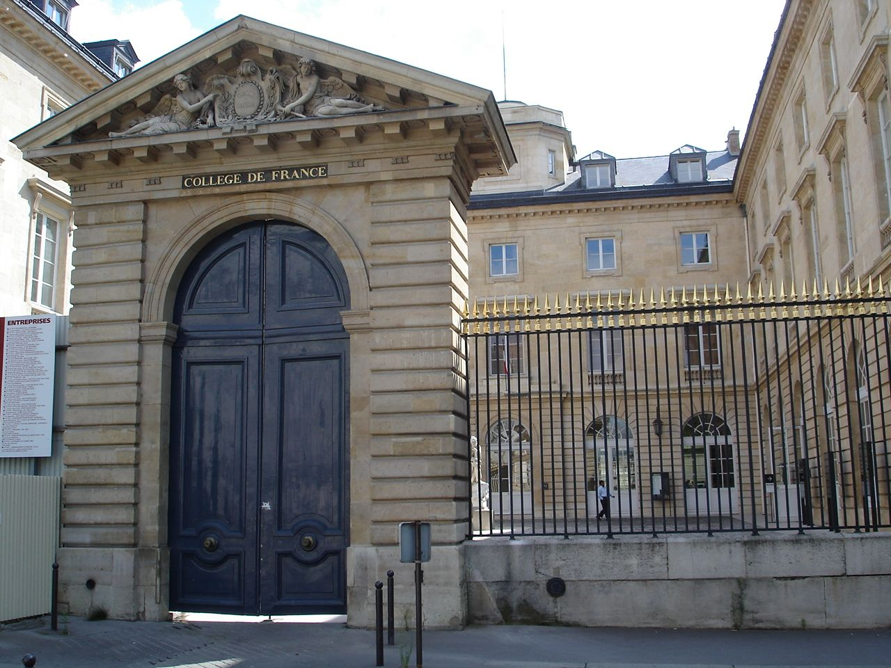 Collège de France. Entrance on Rue des Écoles.